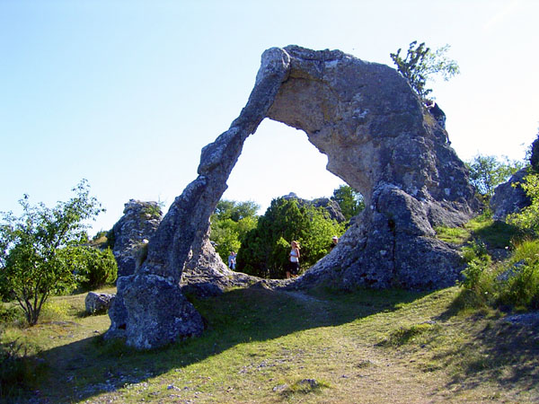 Rauken Lergravsporten på Gotland, med turist.